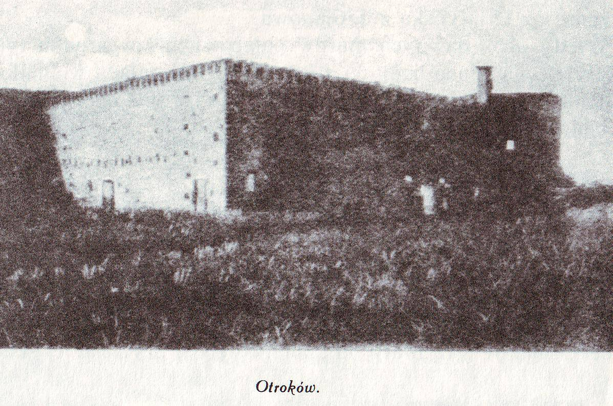 Otroków